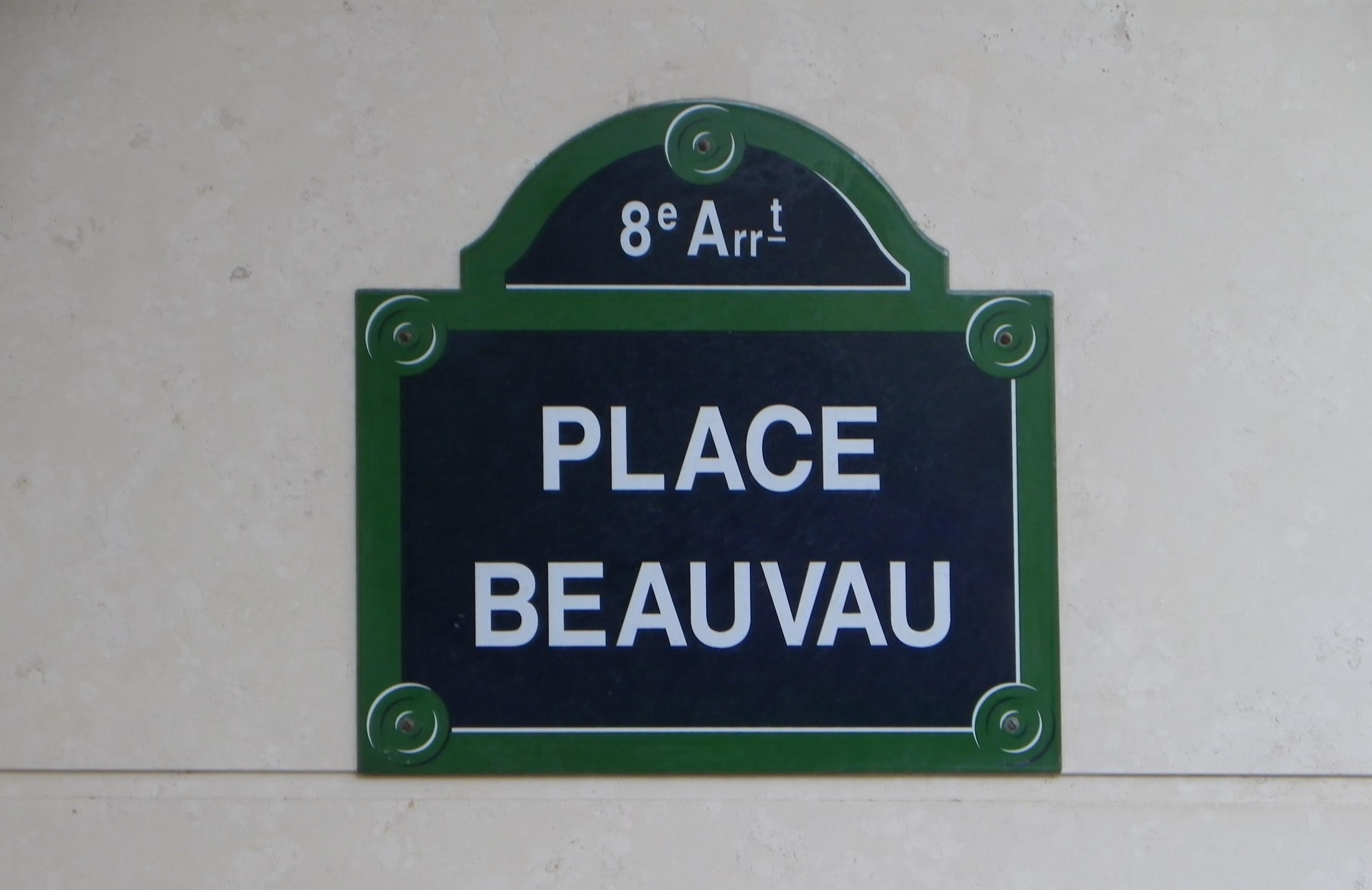 Plaque place Beauvau à Paris